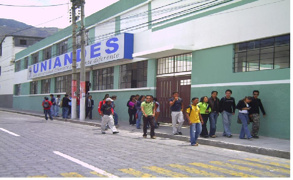 Uniandes Ibarra